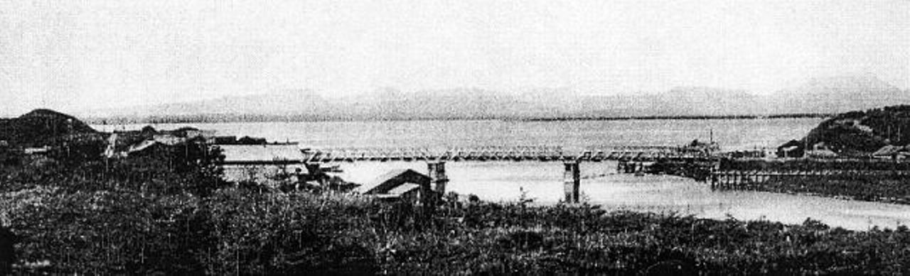 Красногорск, Сахалинская область, Райтиси, 50-е годы XX века.